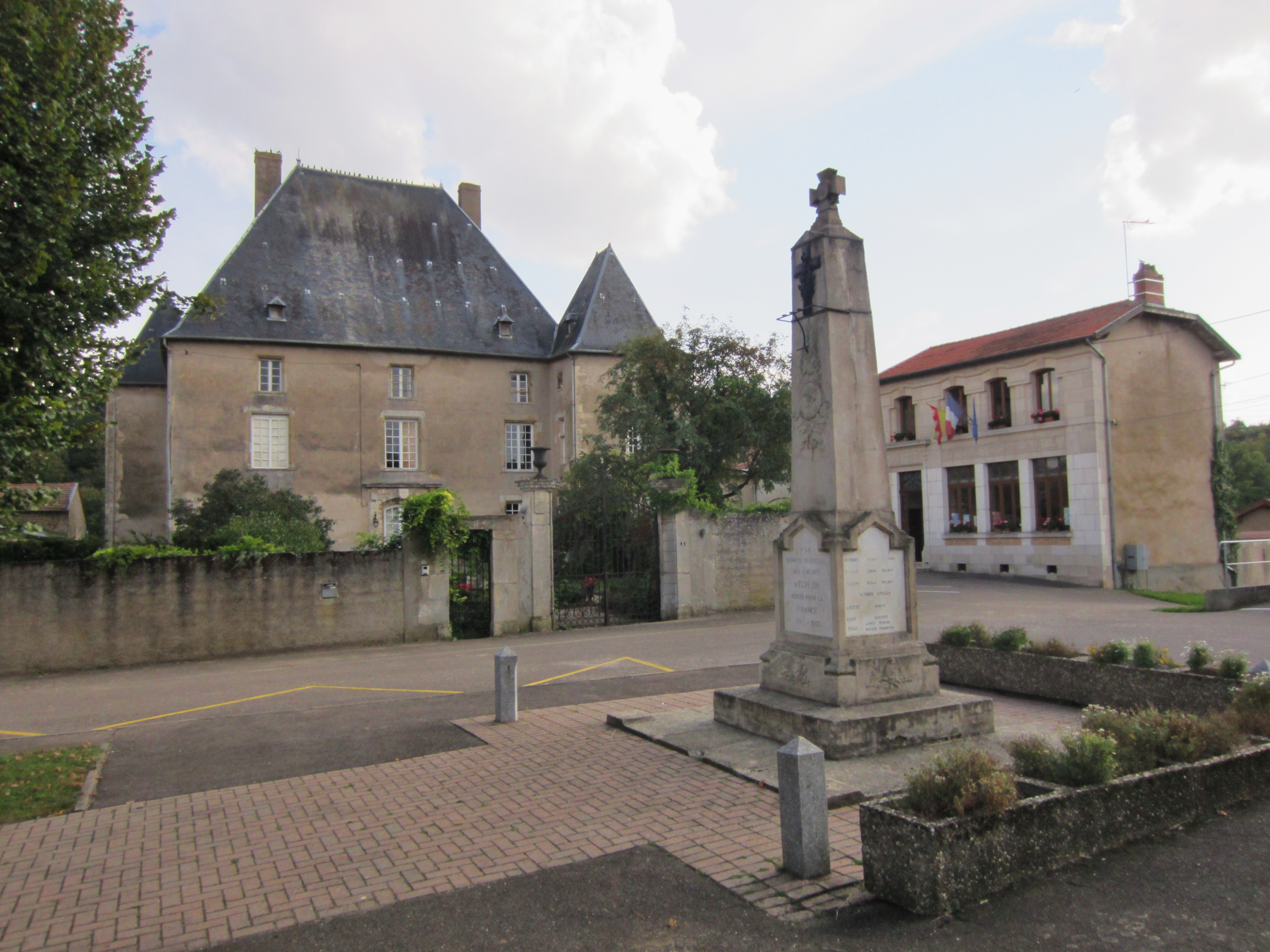 Description place Euvezin place Euvezin